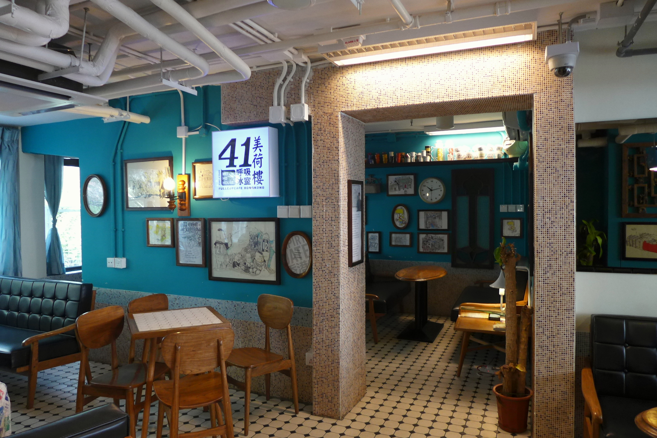 Mei Ho House Fullcup Cafe